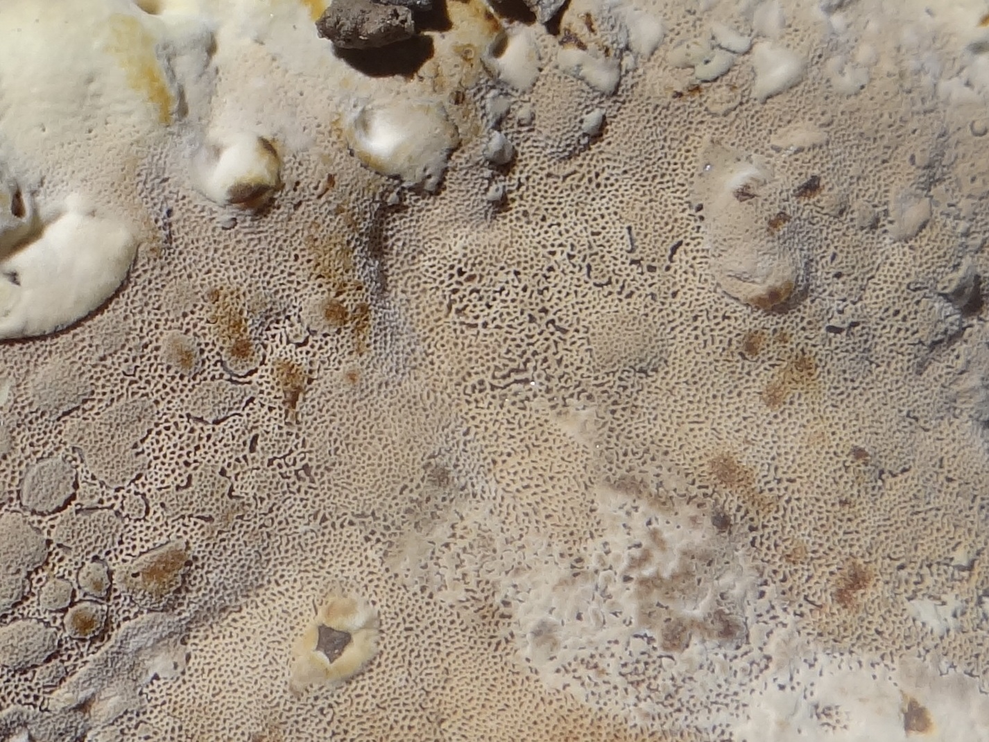 Pseudoinonotus dryadeus. Location: Poland, Puszcza Niepołomicka, rezerwat przyrody "Dębina"